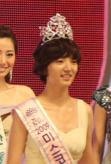 2009 미스코리아 당선자들